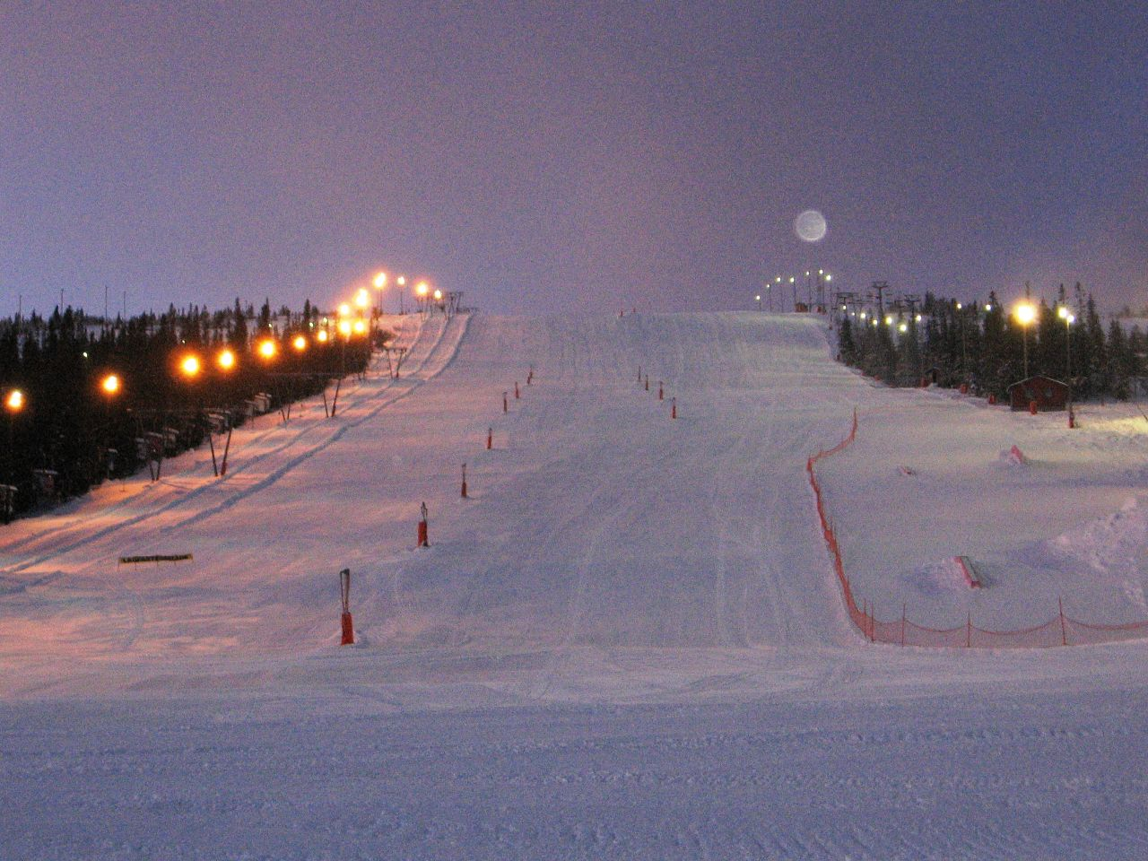 Sälen